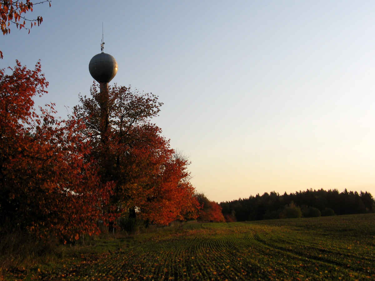 Nýrovský vodojem